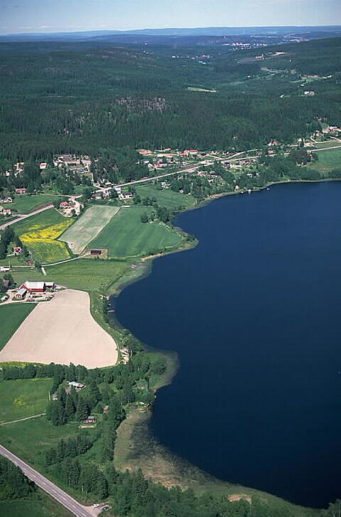 Prästhusberget i bildens mitt. Motiv: Klingsta Nyckelord: Flygbilder, Riksintressen Kategori: Insjömiljöer Prästhusberget i bildens mitt.